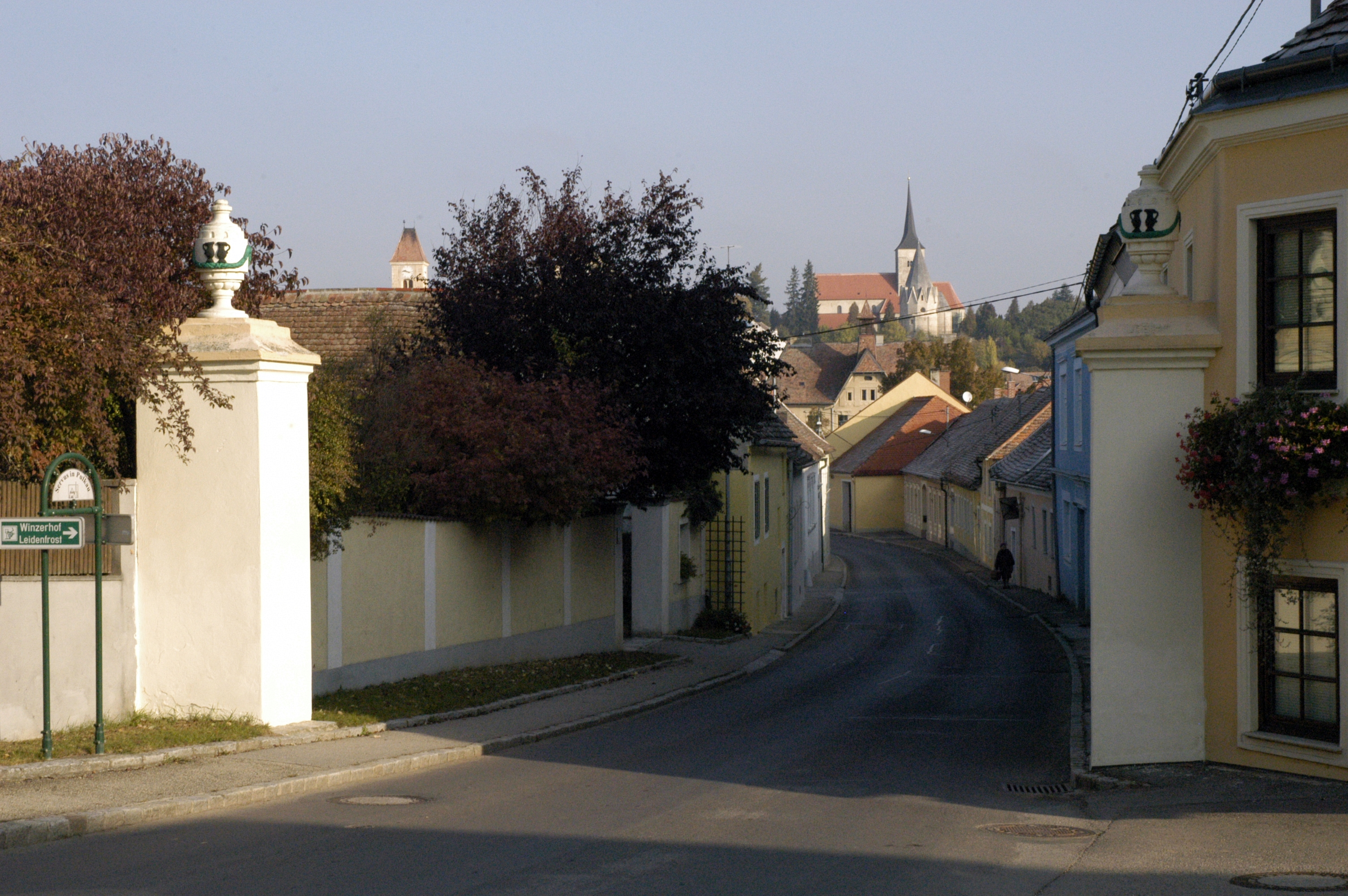 Pfeiler des ehemaligen Markttores in Pulkau